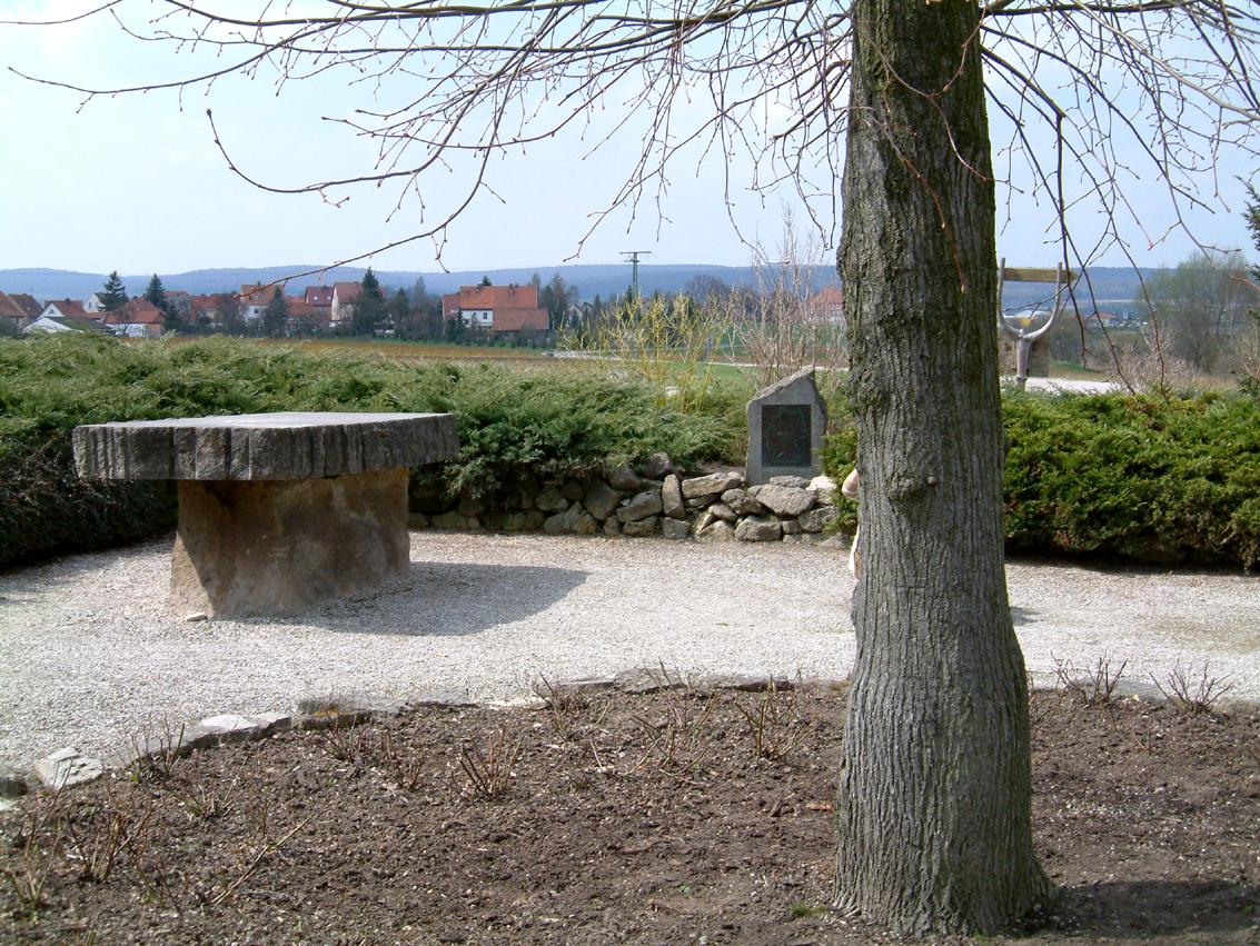 Kaiserlinde am geographischen Mittelpunkt Deutschlands in Niederdorla